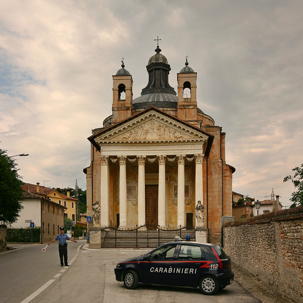 Tempietto, Maser, Veneto, Italy